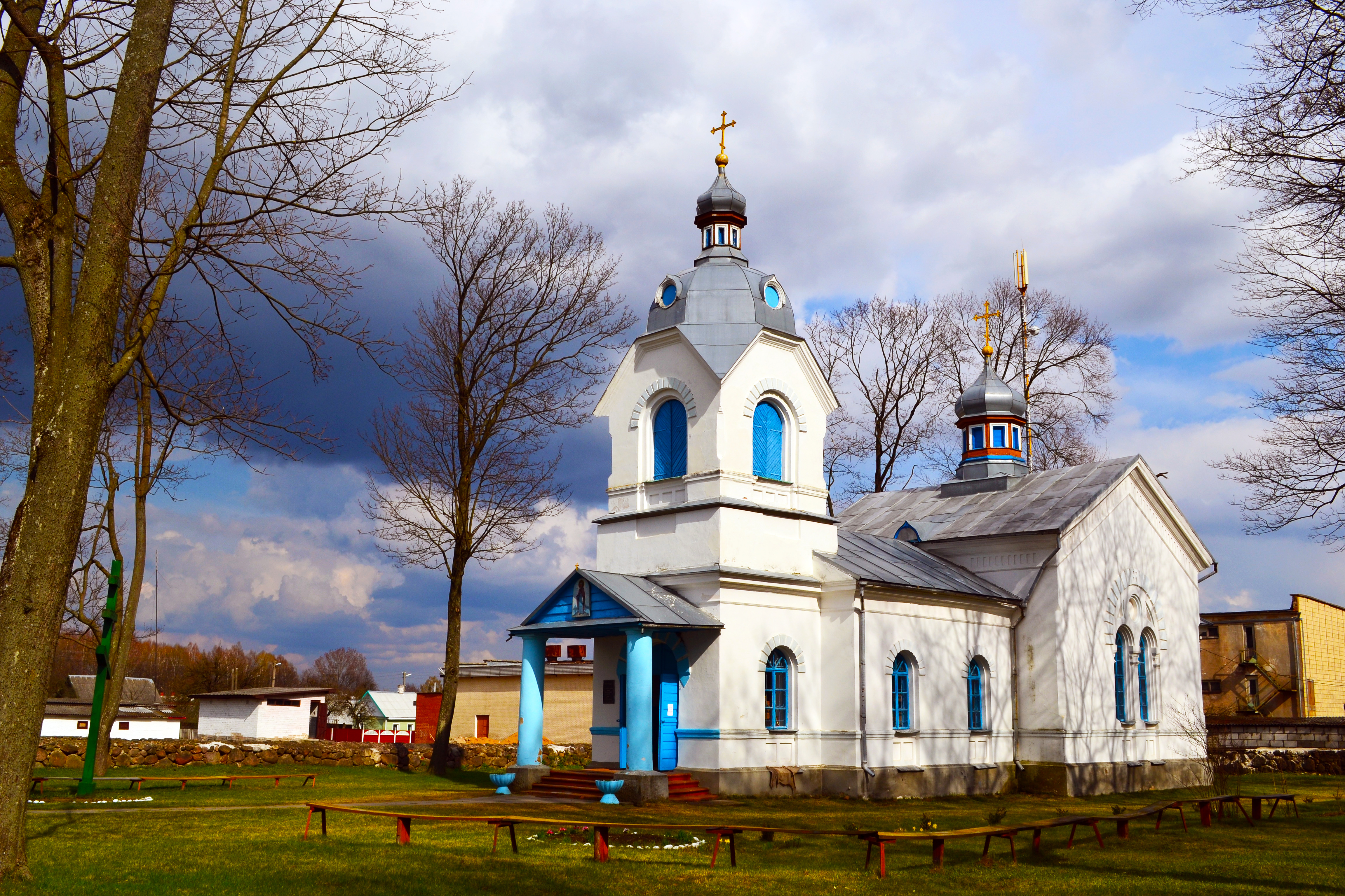 Беларуская (тарашкевіца): Сьвята-Антоніеўская царква ў Косаве. This is a photo of Belarusian heritage monument. Reference number: 113Г000307 ( WLM)